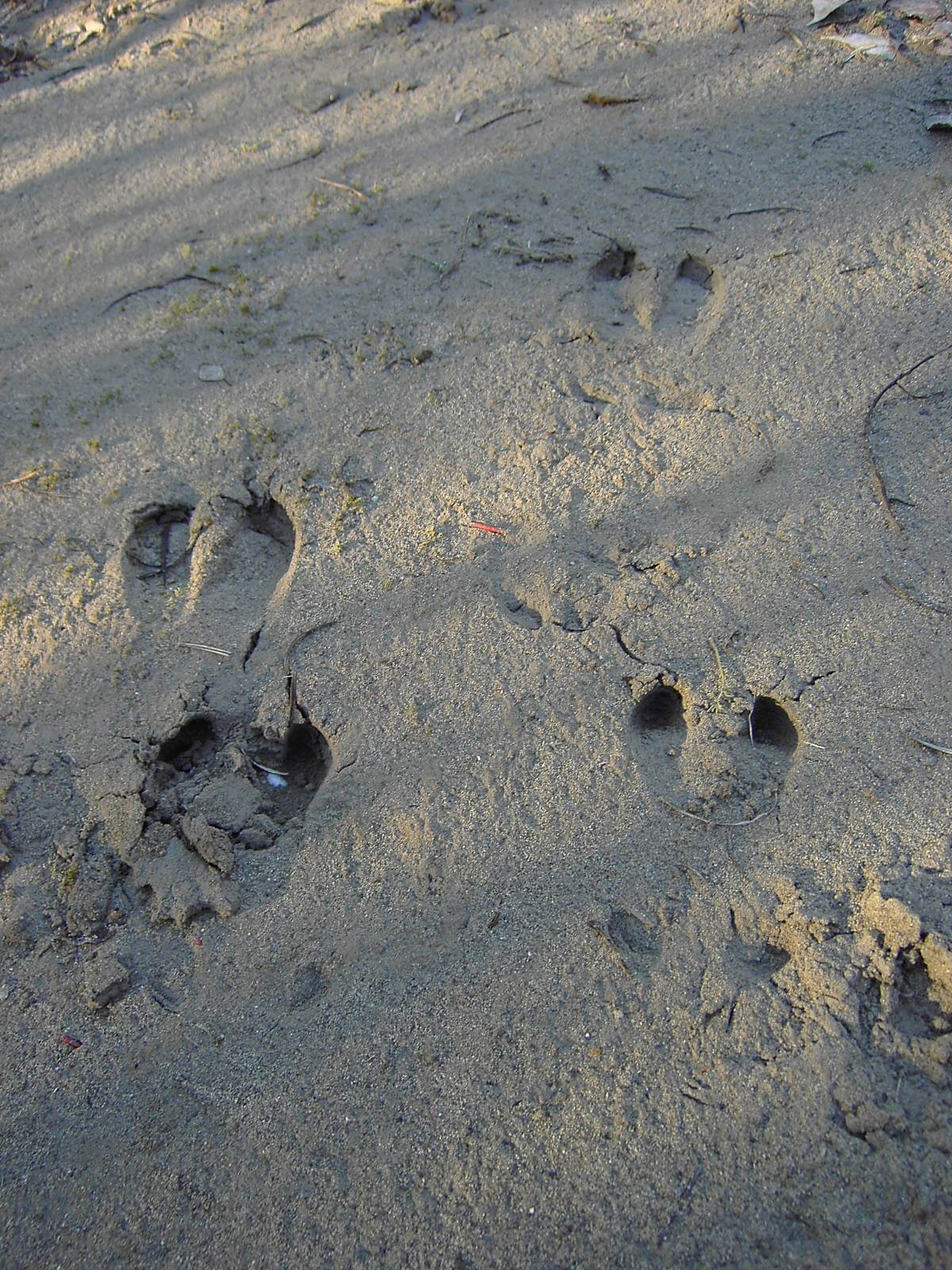 Huellas de jabalíes en la arena húmeda, a orillas del Cinca en Huesca.